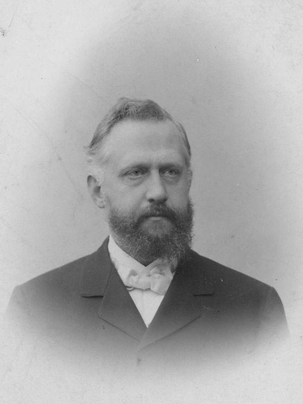 Alexander Koenig, Zoologe Datum: um 1900 Quelle: Link zum Bild: Urheber: unbekannt Hinweis zum Bild: Pressemitteilung - Informationsdienst Wissenschaft, Bild zu: Auf Zucker gebaut - Alexander Koenig und sein Museum in Bonn, Zoologisches Forschungsinstitut und Museum Alexander Koenig, 13.02.2008 Hinweis zur Nutzung des Bildes: Die Verwendung des Bildmaterials zur Pressemitteilung ist bei Nennung der Quelle vergütungsfrei gestattet. Das Bildmaterial darf nur in Zusammenhang mit dem Inhalt dieser Pressemitteilung verwendet werden. vgl